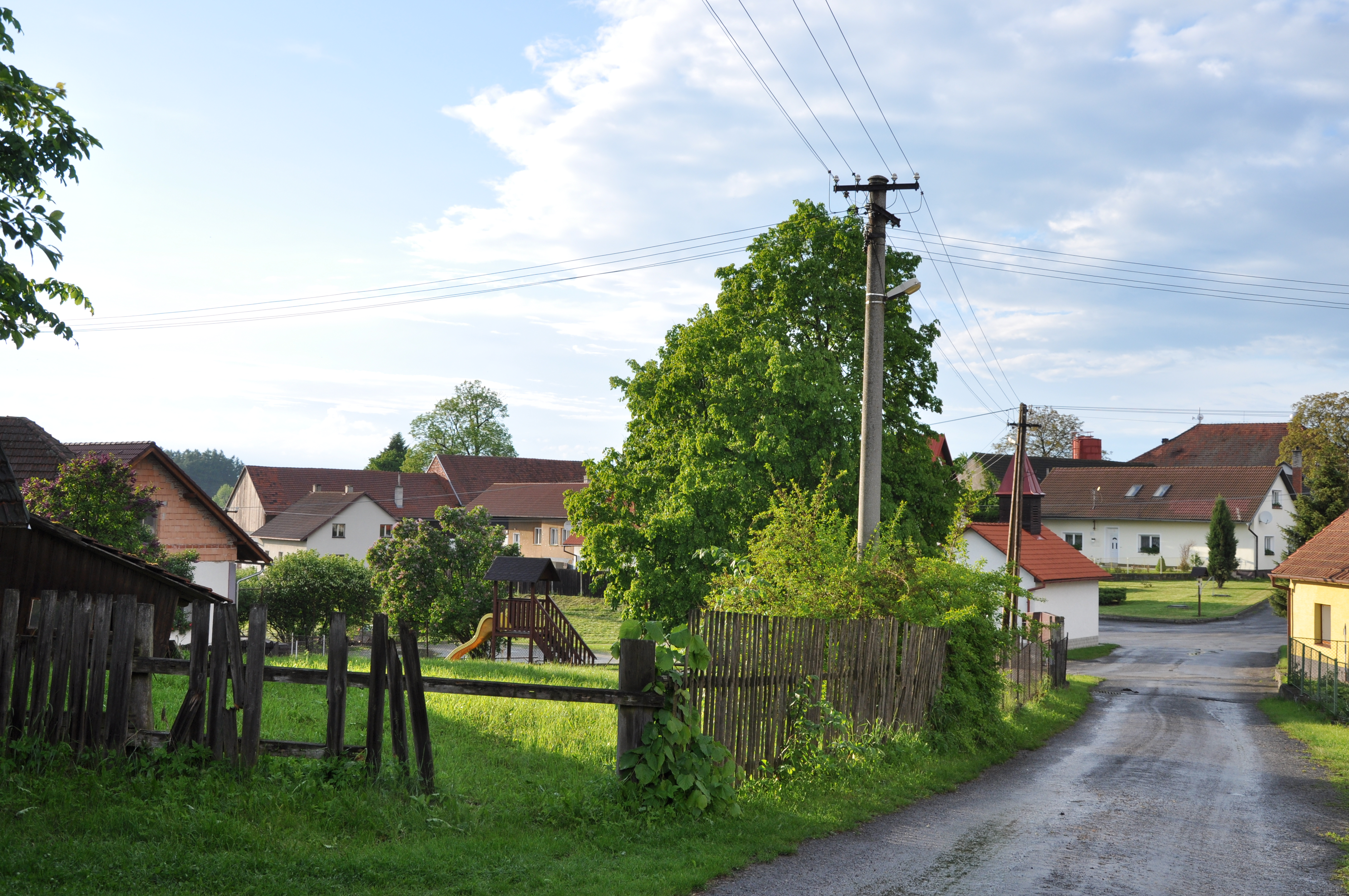 Milasín - pohled do vesnice ze silnice od Bukova